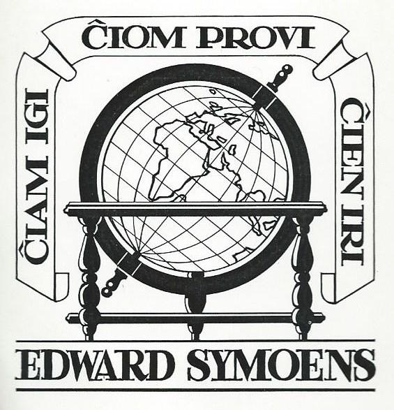 Ekslibriso de Edward Symoens (1915-1995)